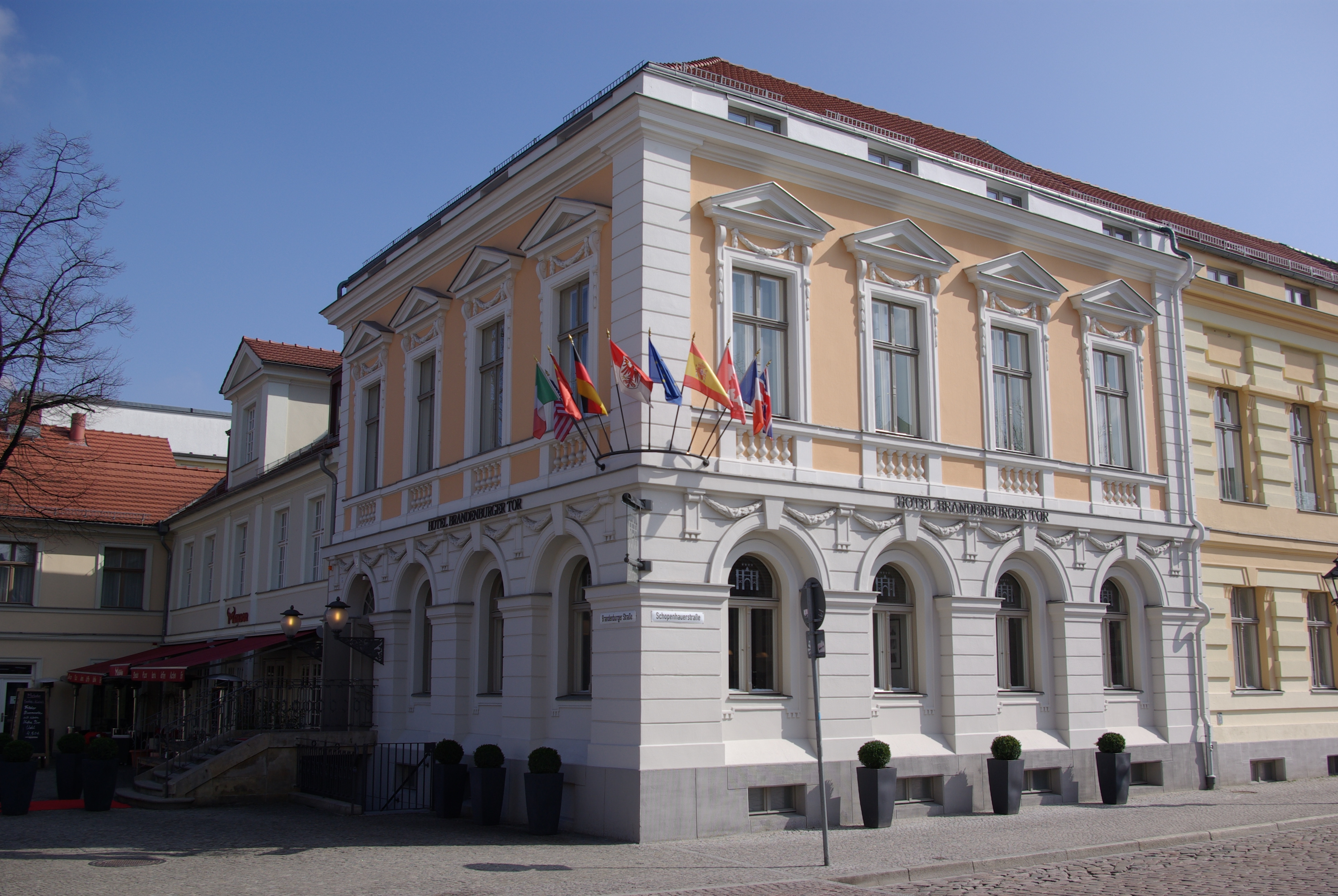 Potsdam in Brandenburg. Das Haus in der Nähe des Brandenburger Tores steht unter Denkmalschutz. In dem Haus befindet sich das Hotel Brandenburger Tor.